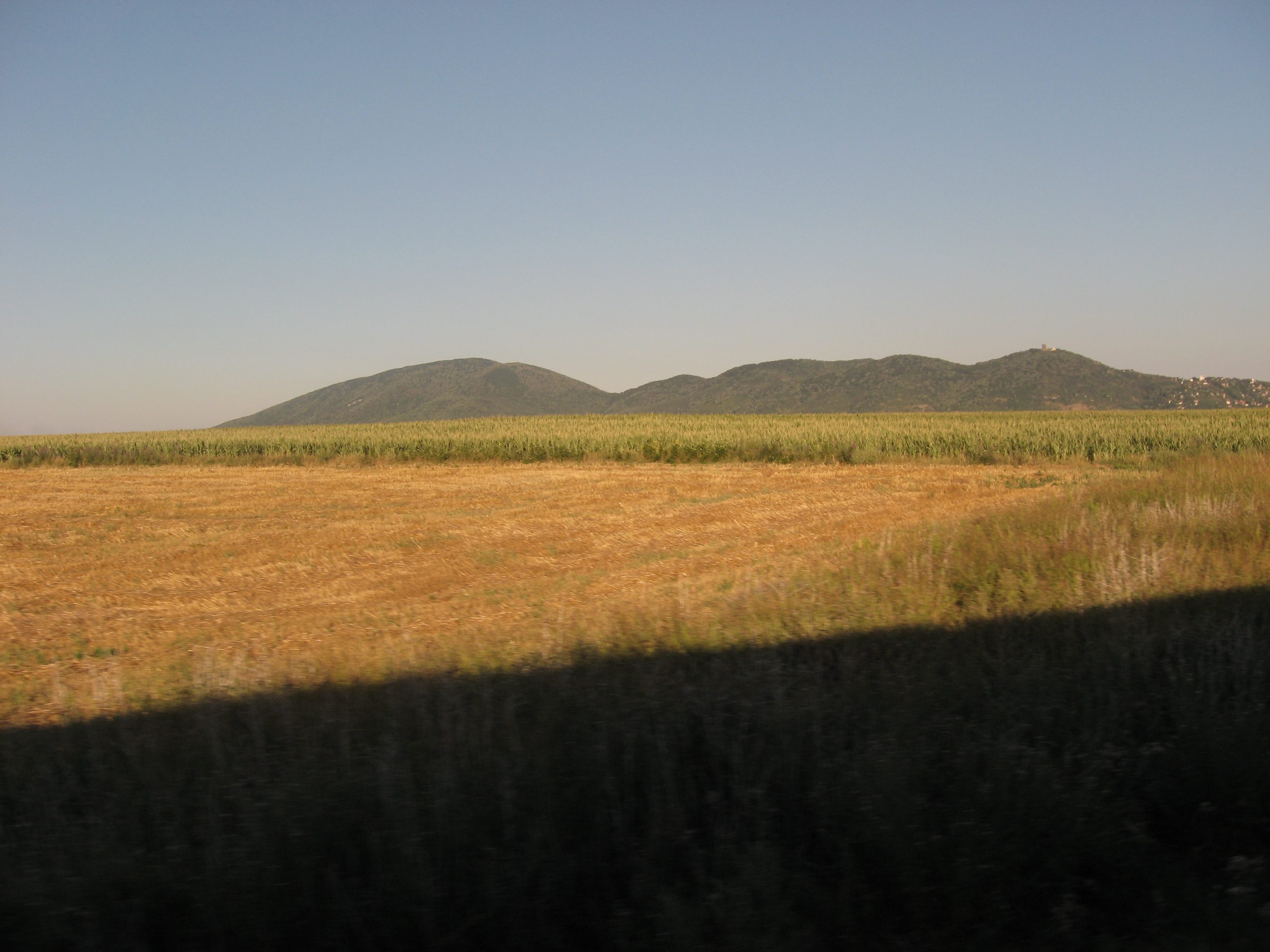 Vrsacke planine Jelena I Dragan Cvetkovic Nis Licensing